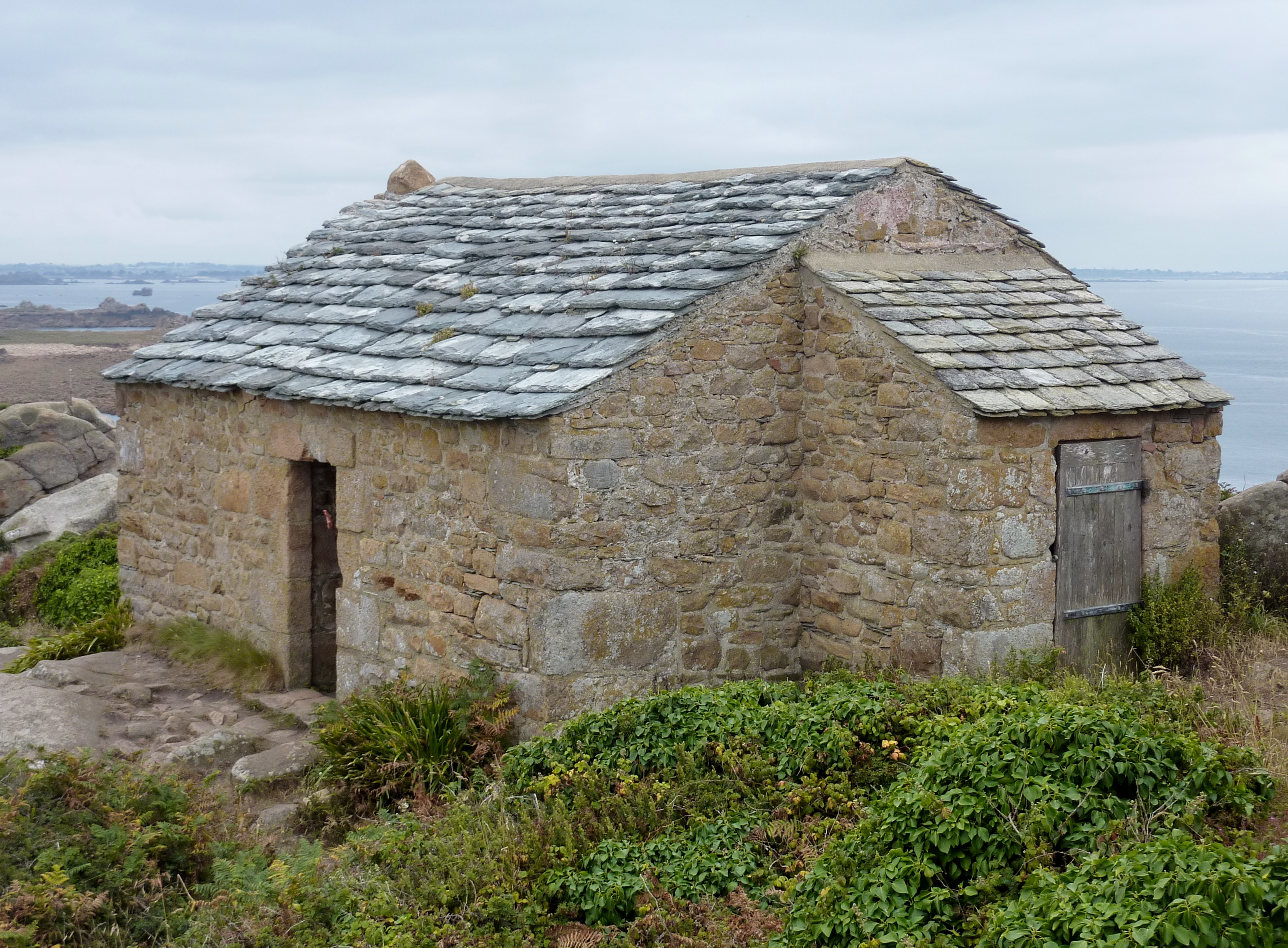 Plougasnou : la maison du douanier à la Pointe de Primel (construite au début du XIXe siècle)